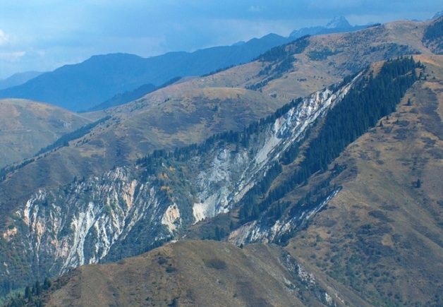 фото сделано в окрестностях данной местности